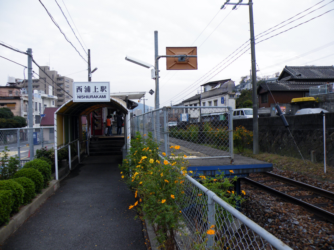 JR九州長崎本線西浦上駅